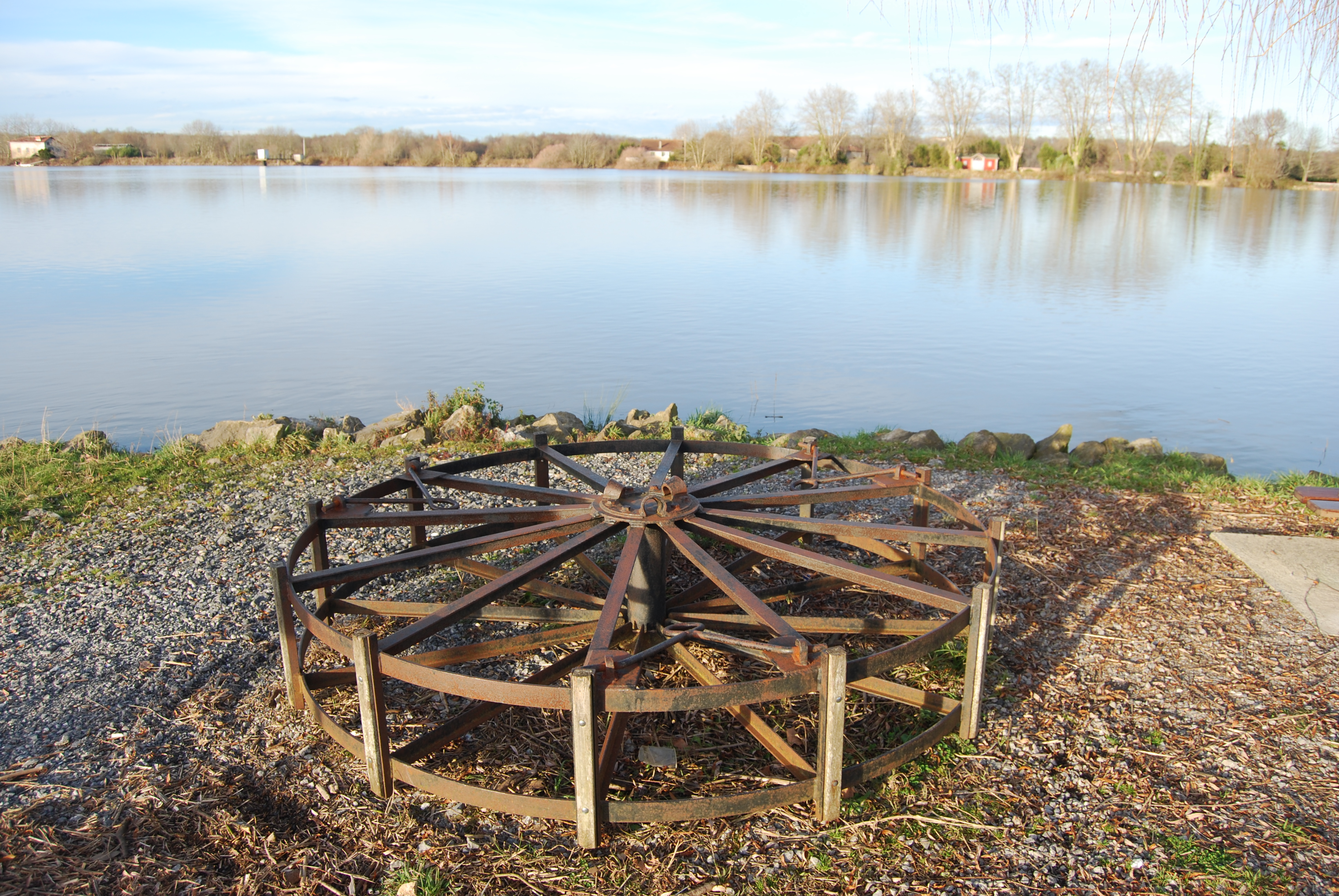 Cabestan sur la rive gauche de l'Adour, à Urt, construit par l'association Val d'Adour Maritime.